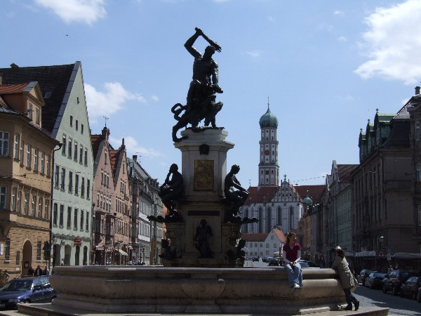 Augsburg Herkulusbrunnen in der Maximilianstraße